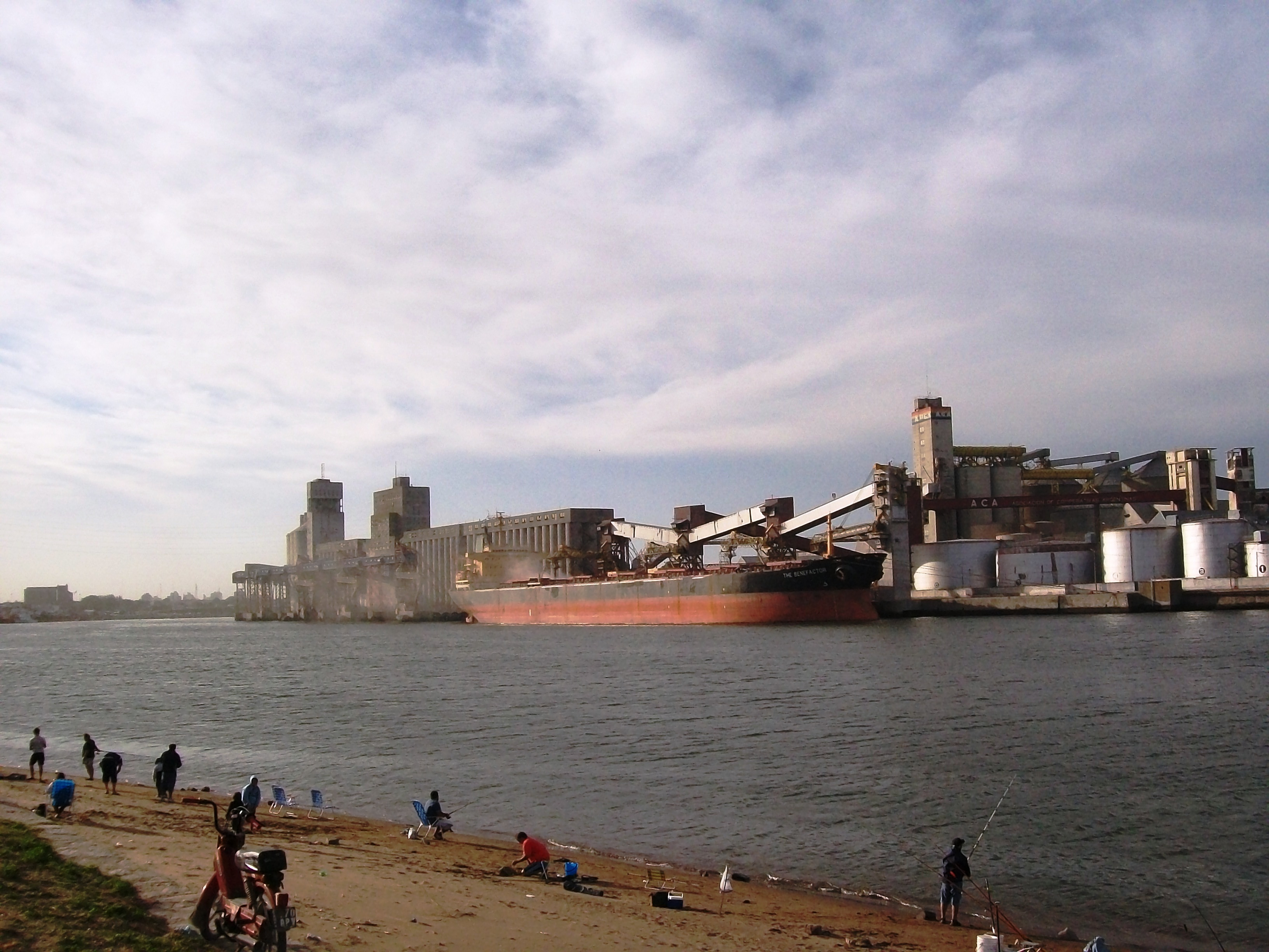 Puerto de Quequen , provincia de Buenos Aires, Argentina